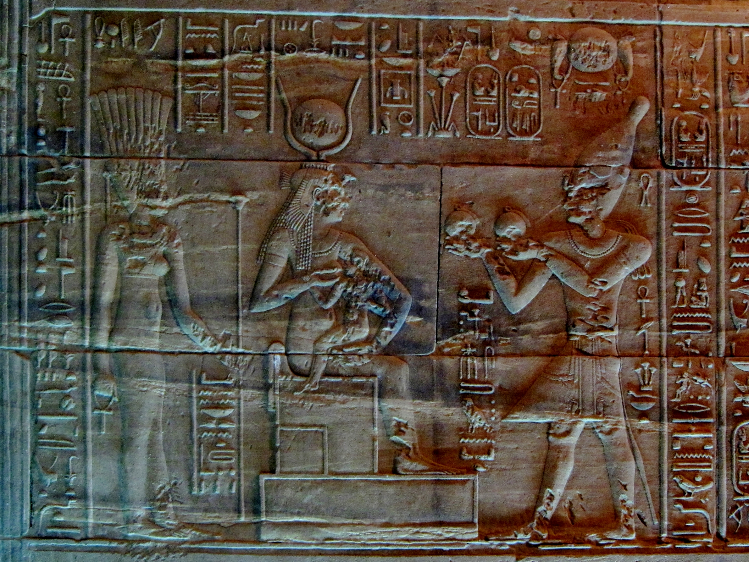 Ptolemaios II. bringt der Isis und ihrem Kind Hor-pa-chered im Beisein der Göttin Anuket Gaben dar. Relief im Naos des Isis-Tempels von Philae auf der Insel Agilkia, Ägypten